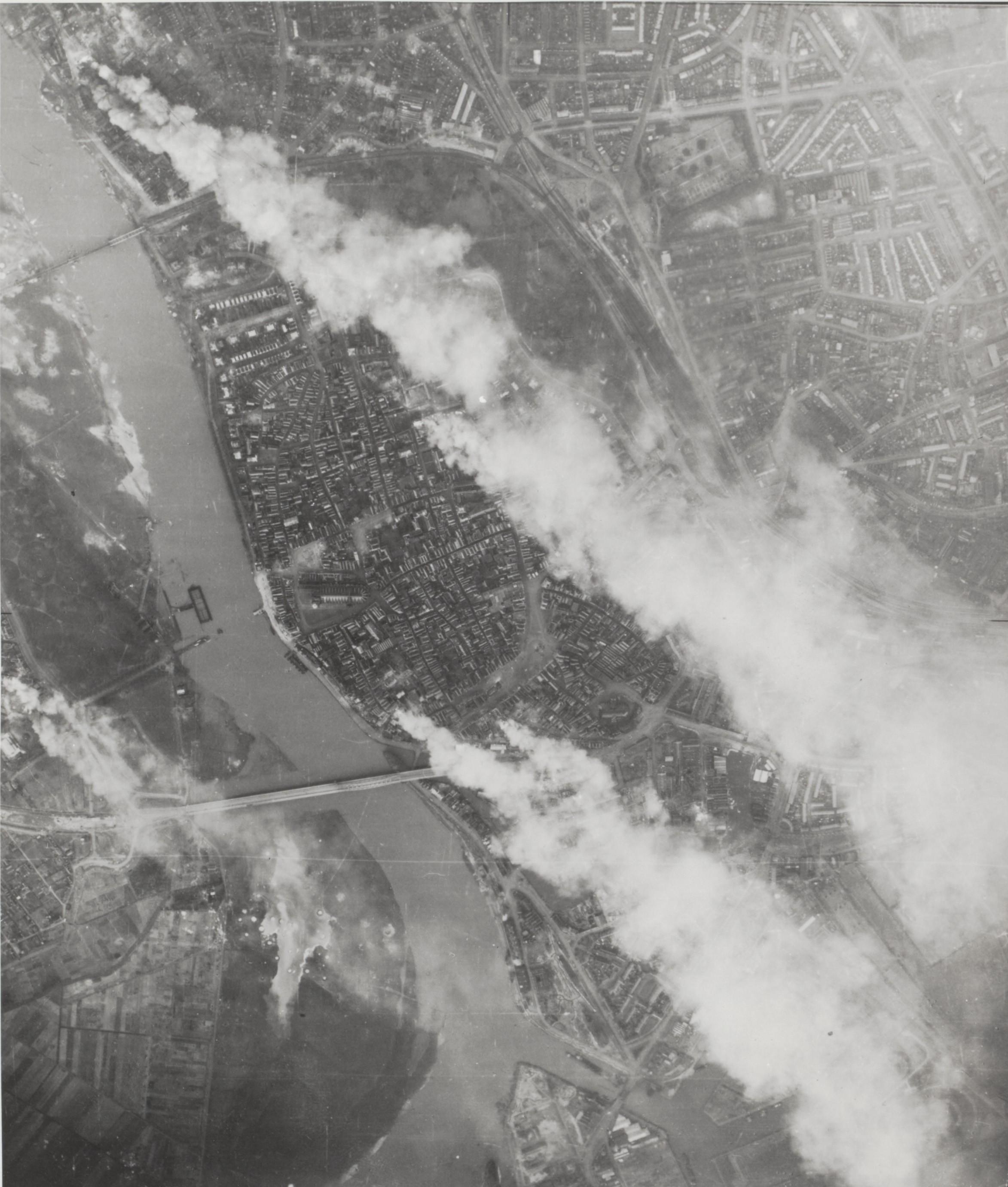 Luchtopname. Deventer, na de Britse luchtaanval op 6 februari 1945. Om de verbinding tussen de Duitsers hier en Duitsland te verbreken probeerden de geallieerden de verkeersbrug en de spoorbrug verschillende keren te bombarderen. Op 6 februari vielen daarbij 61 doden en vele huizen en gebouwen werden verwoest. De bruggen bleven (weer) intact. metadata about this photo